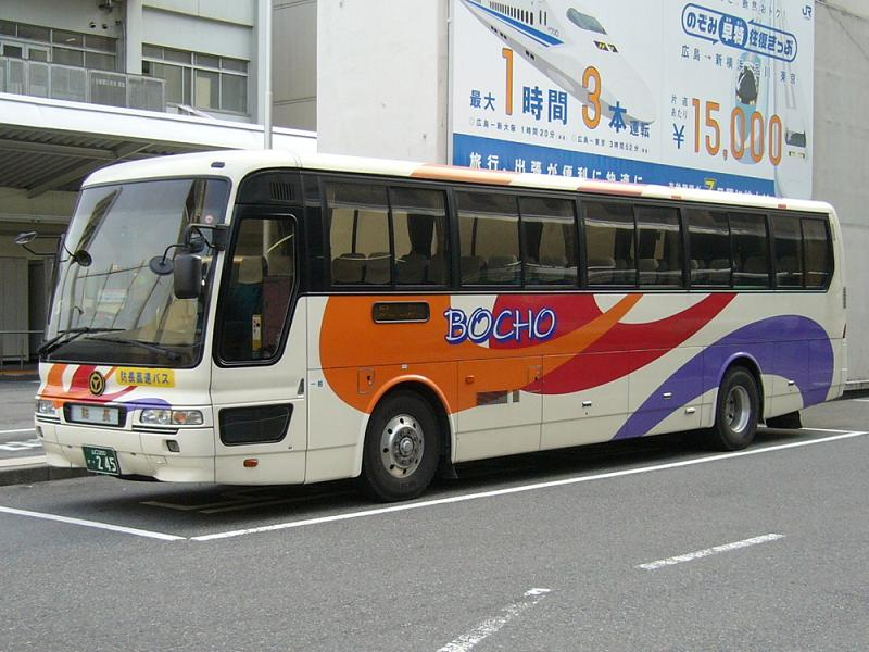 登録番号 山口200か・245 防長交通周南営業所所属 広島～徳山線用 2006年3月13日 広島バスセンターにて撮影